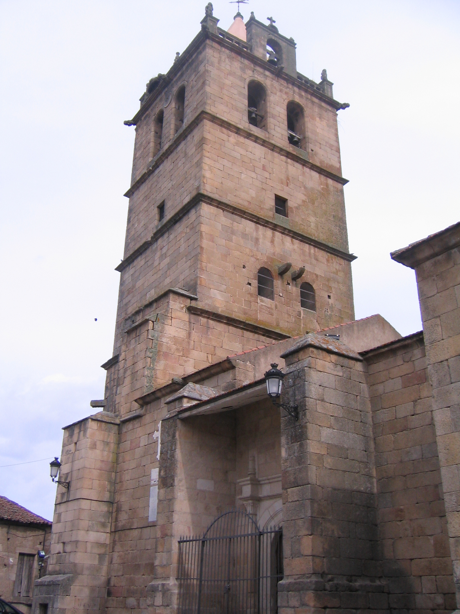 Iglesia de San Salvador en Aldeadávila de la Ribera (Salamaca) España.